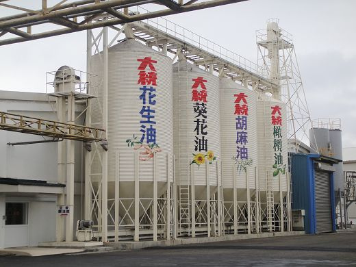 中文（台灣）: 大統醬油參觀工廠，地址：彰化縣鹿港鎮工業西七路1號。